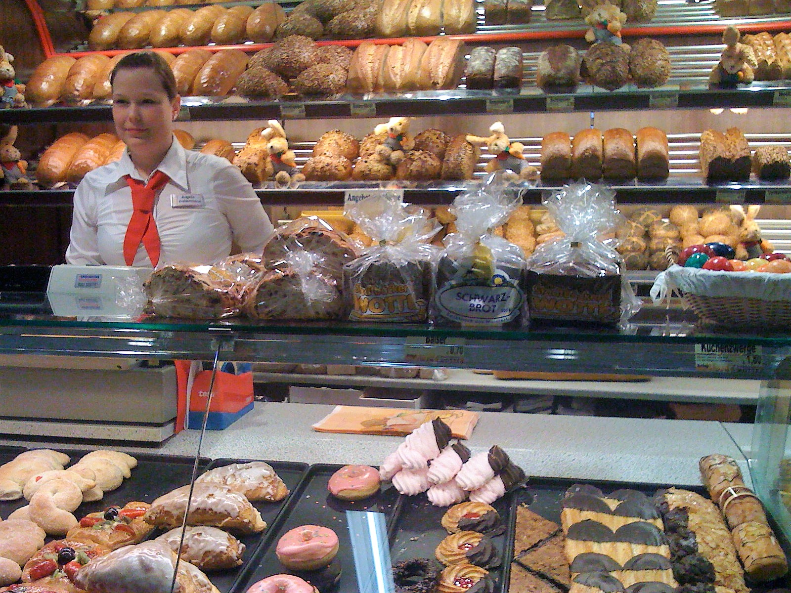 Bäckerladen in Weener in Niedersachsen, Deutschland.